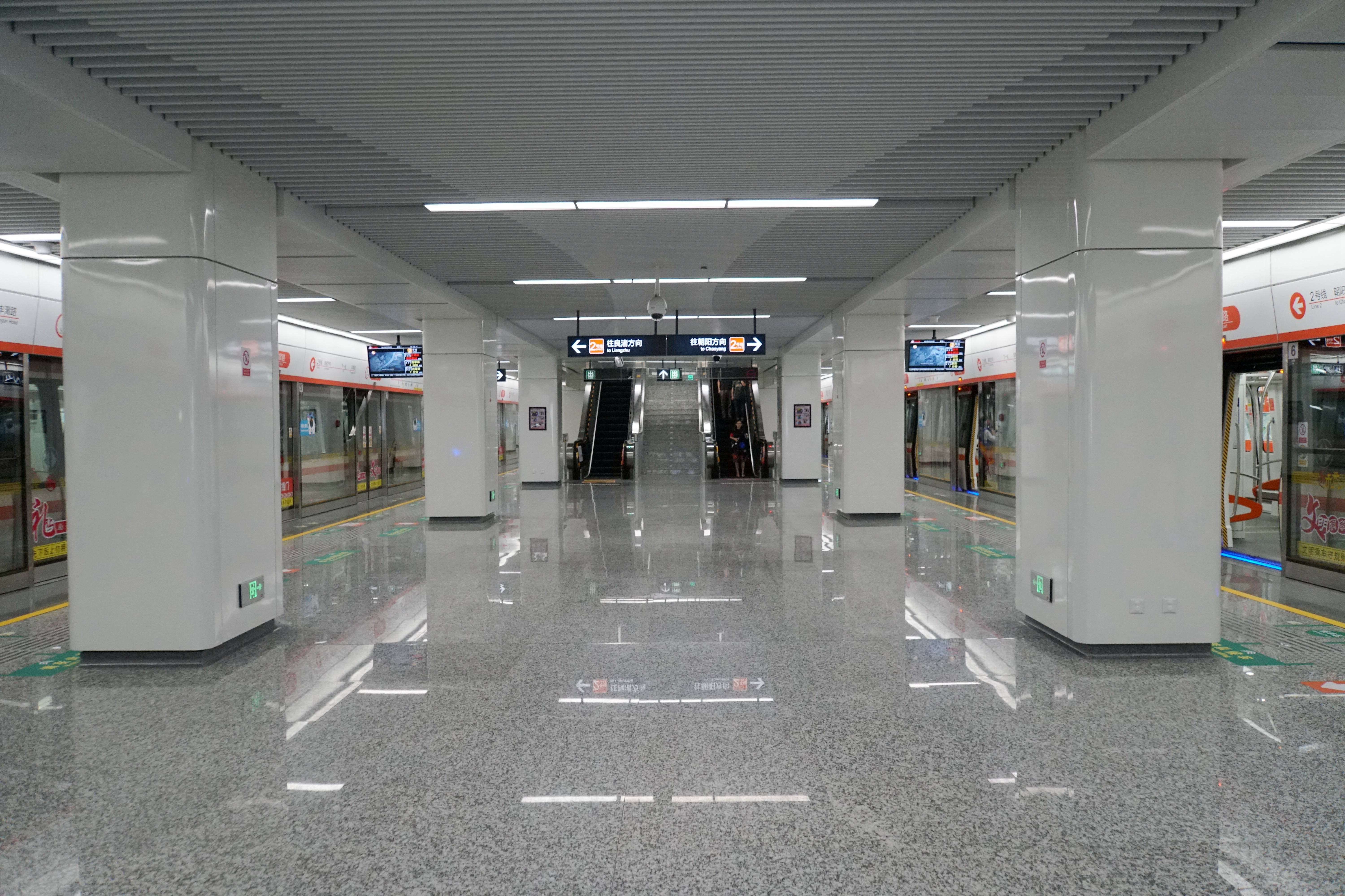 古翠路站站台